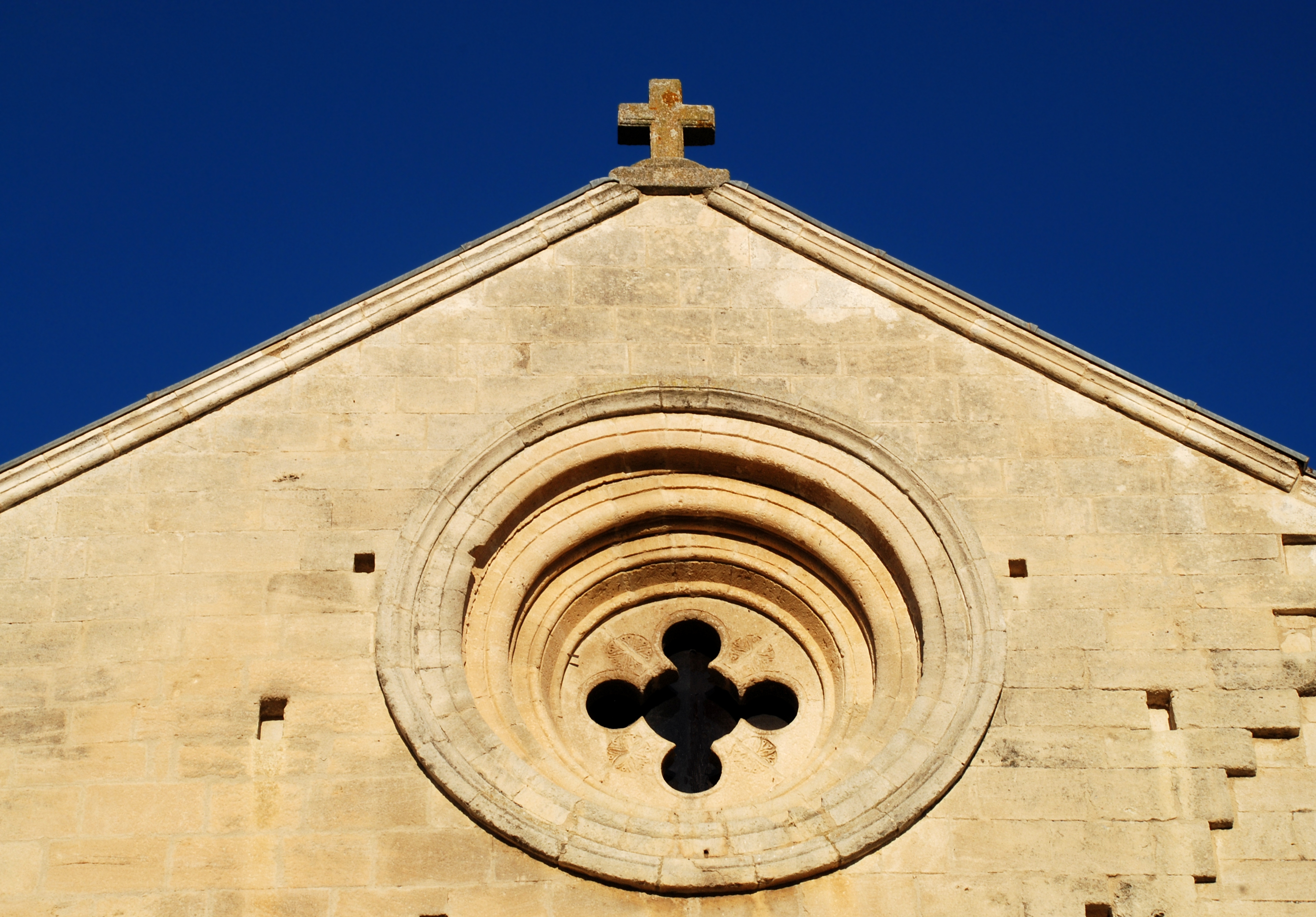 France - Provence - Prieuré Notre-Dame de Salagon